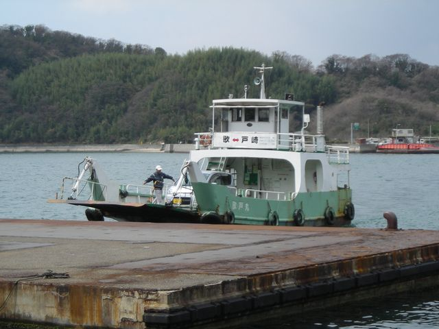 画像